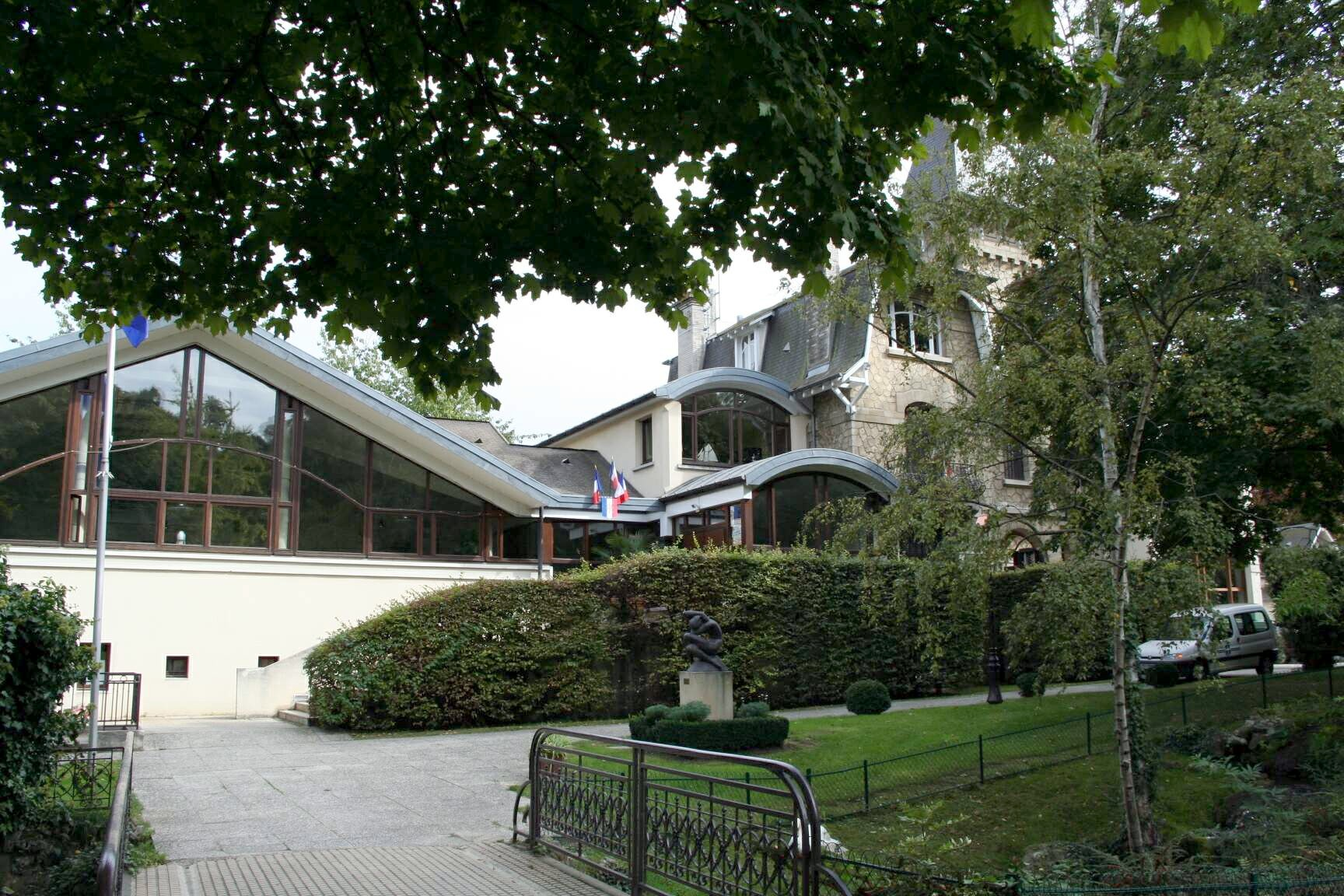 Mairie de Villennes-sur-Seine - Yvelines (France)